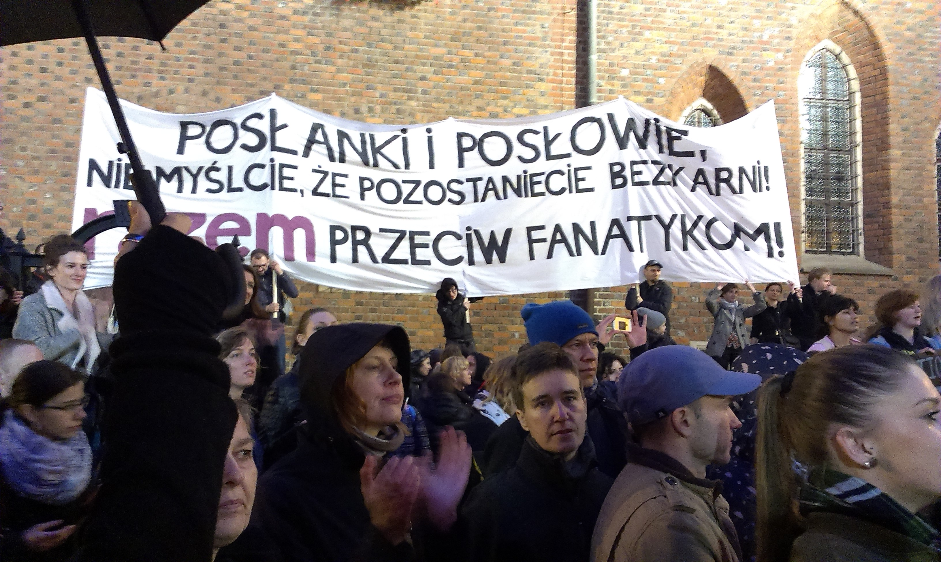 Ogólnopolski strajk kobiet, 3 października 2016, demonstracja pod pręgierzem na Rynku we Wrocławiu - tzw. Godzina K. Transparent Partii Razem.